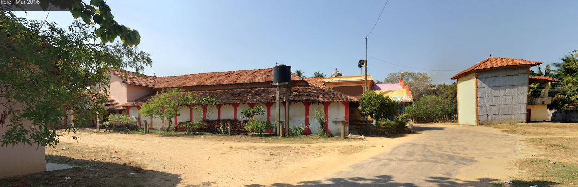 ஆலய அமைவிடம்